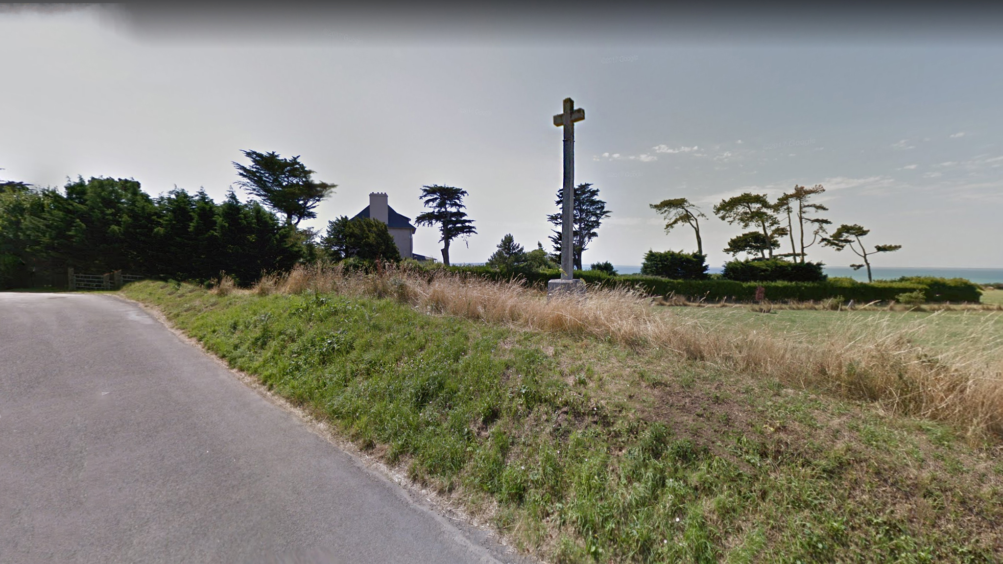 Sur la falaise de Carolles Lieux dit "La Croix Paqueret"